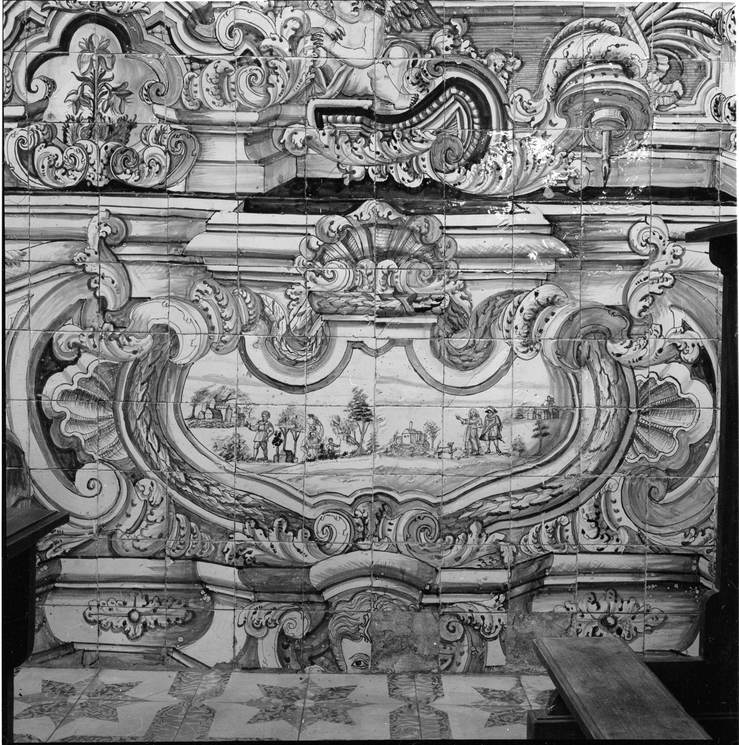 Silhar com medalhão de paisagem. Azulejos do século 18. Fotógrafo: João Miguel dos Santos Simões, 1907-1972. Data de produção da fotografia original: 1960-1970. [CFT009.0352n.ic]